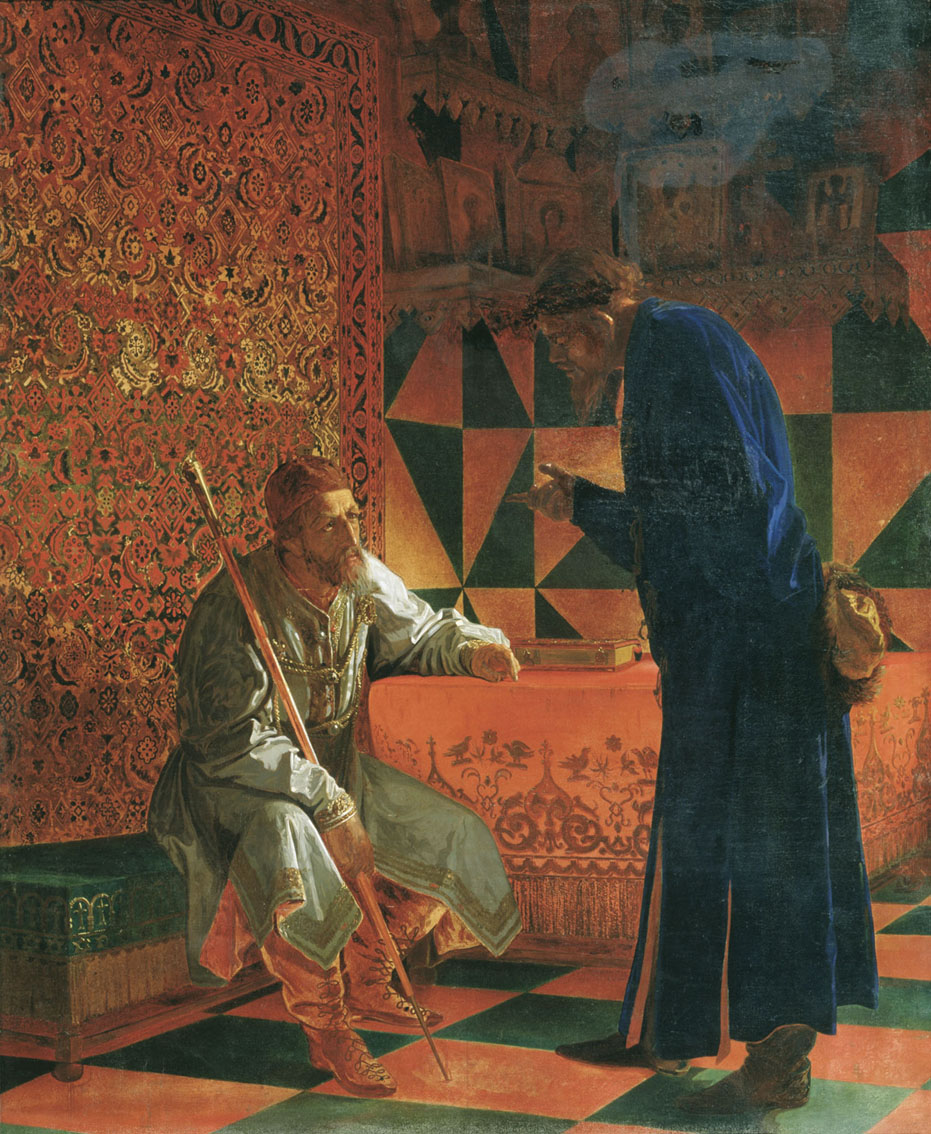 Иван Грозный и Малюта Скуратов. Ivan the Terrible and Malyuta Skuratov